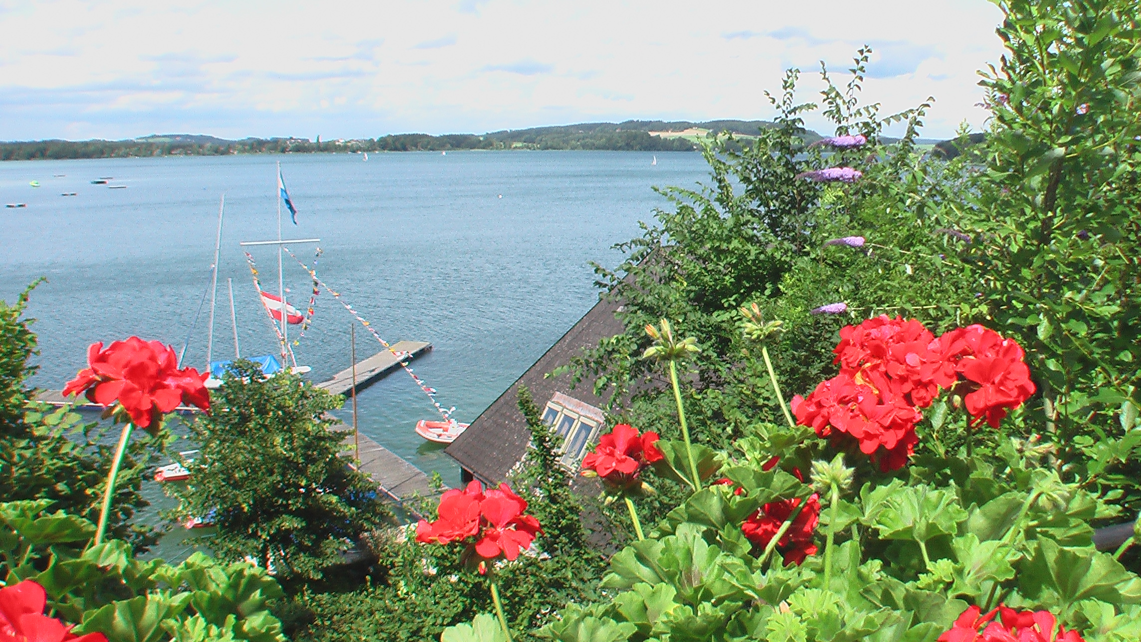 Farbenpracht am Mattsee